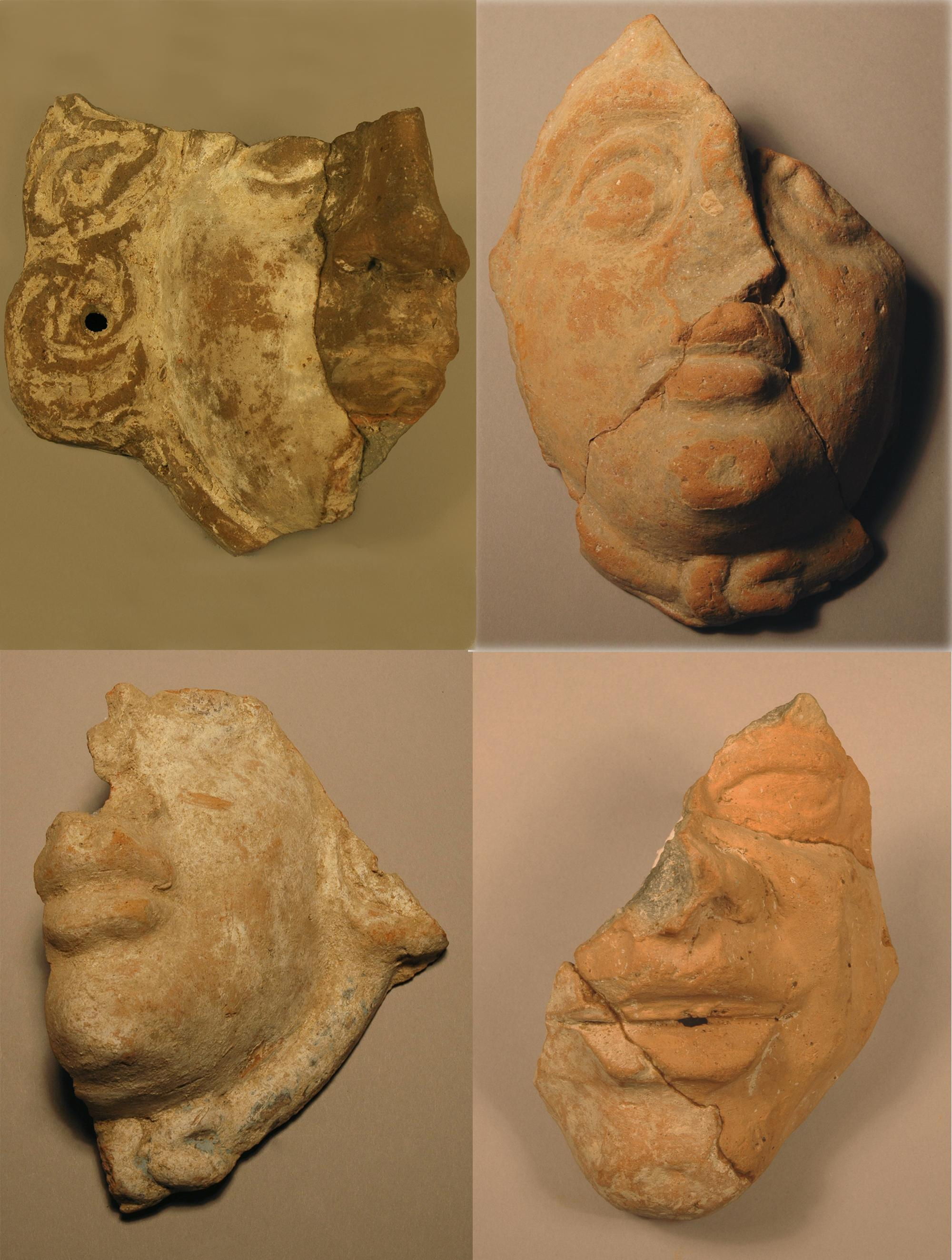 Màscares de terracota de la ciutat ibèrica d'ullastret